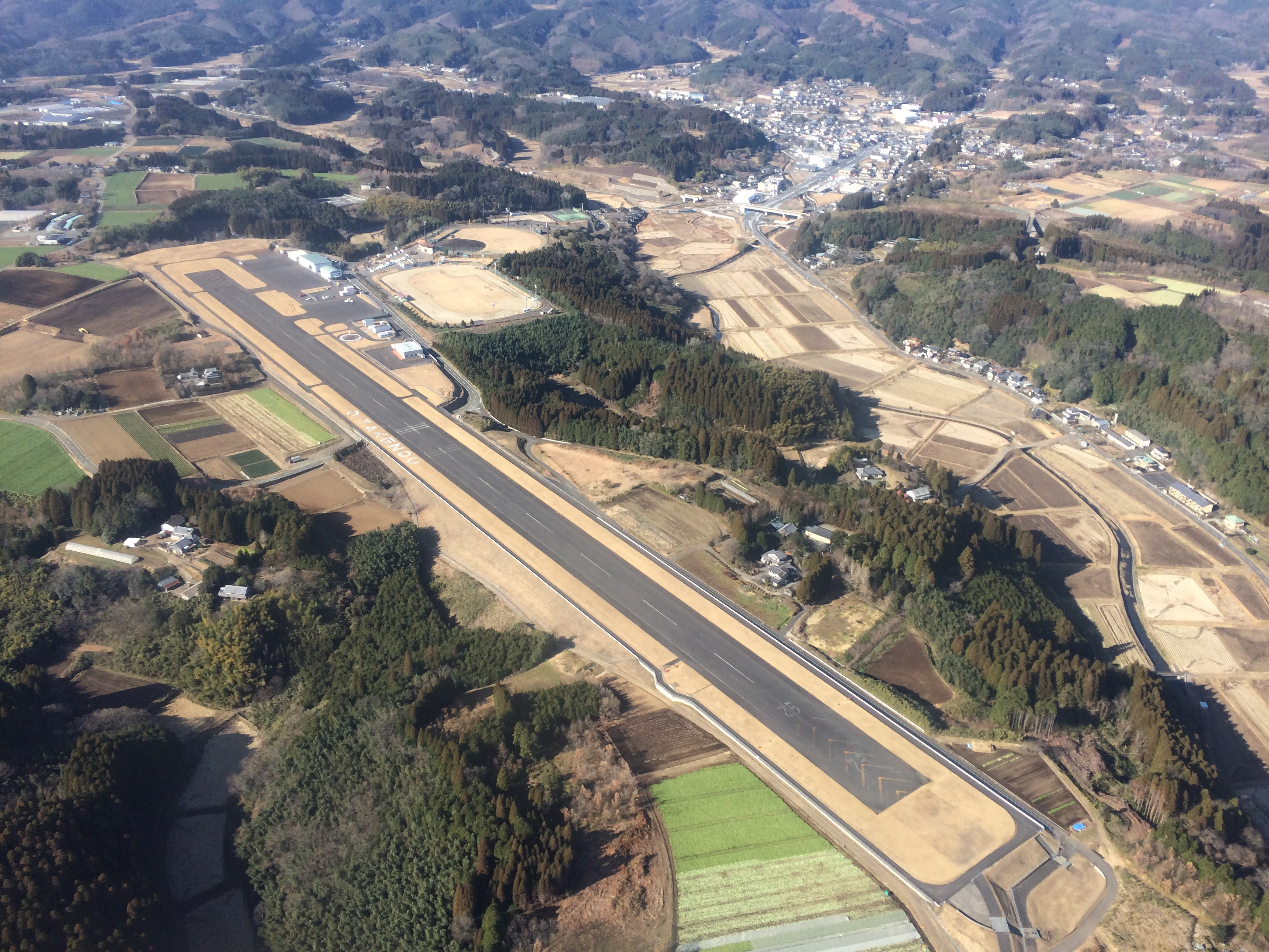 大分県央飛行場 2012/12/22撮影